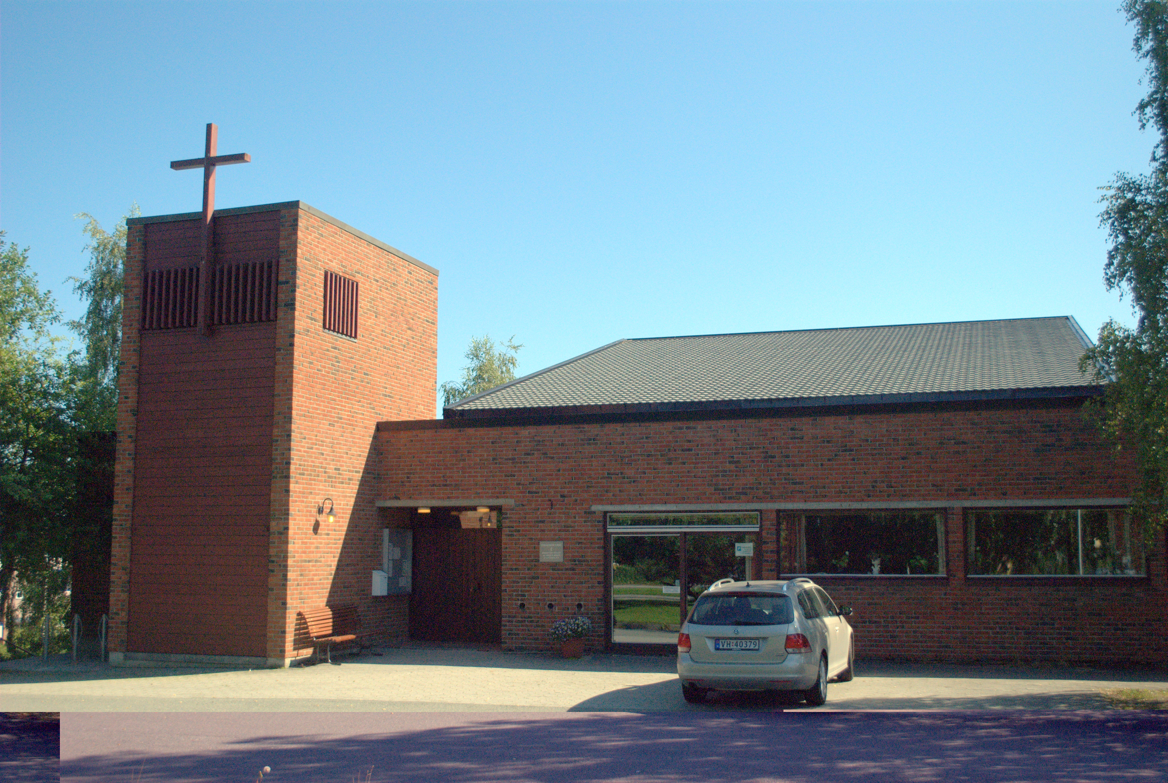 Strindheim kirke i Trondheim